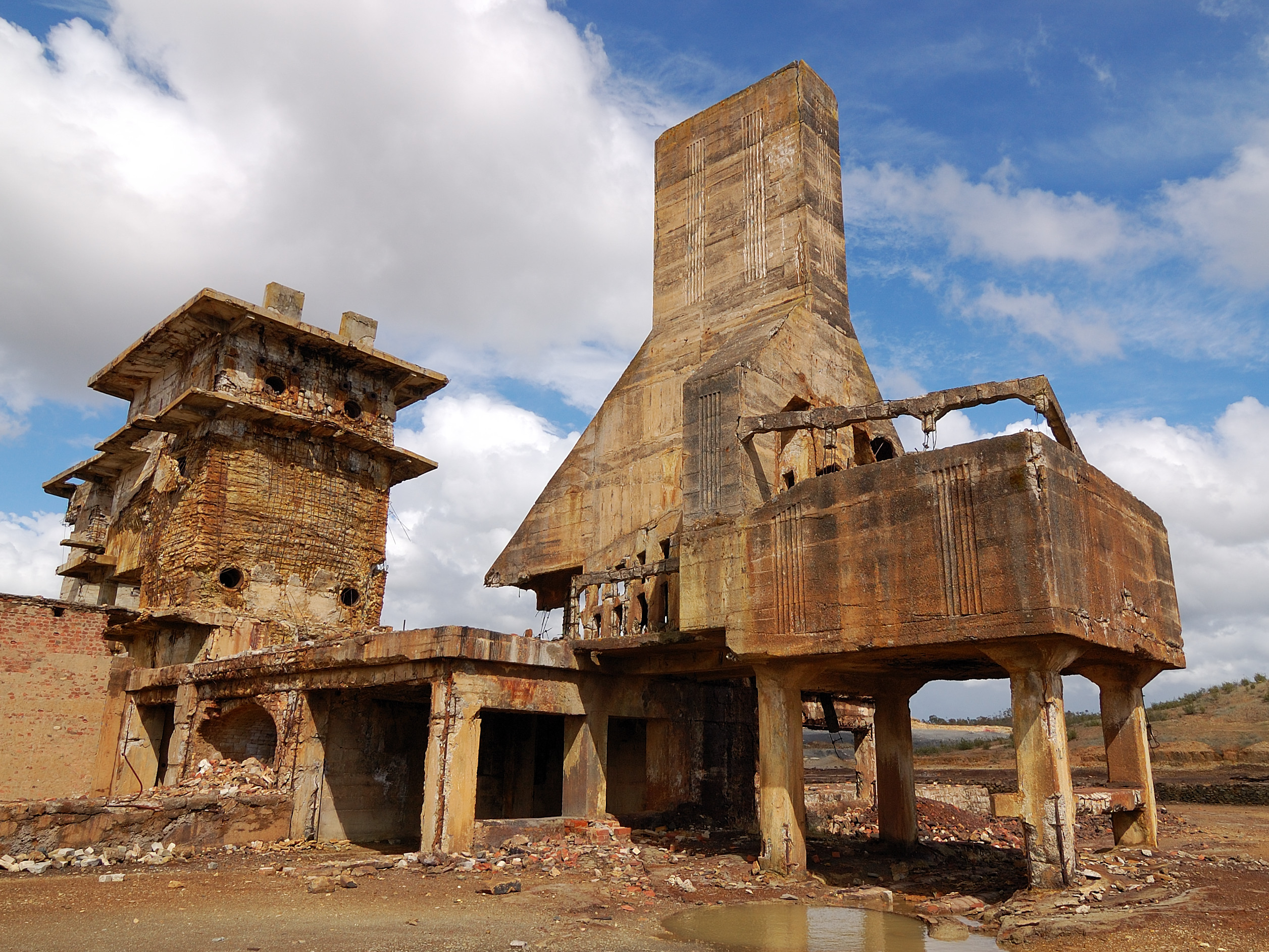 Mina de São Domingos, Portugal [2011]